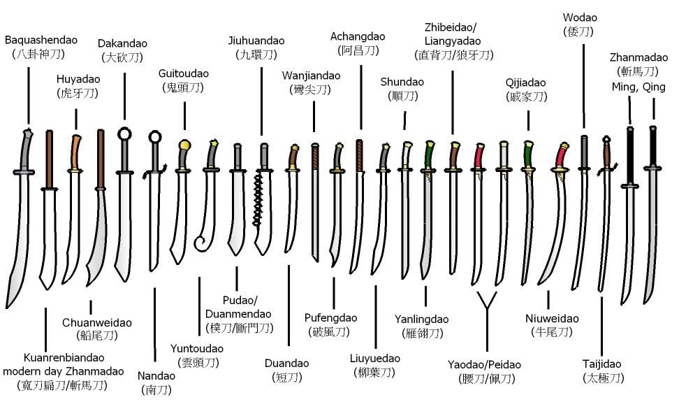 List of the many types of dao used in China